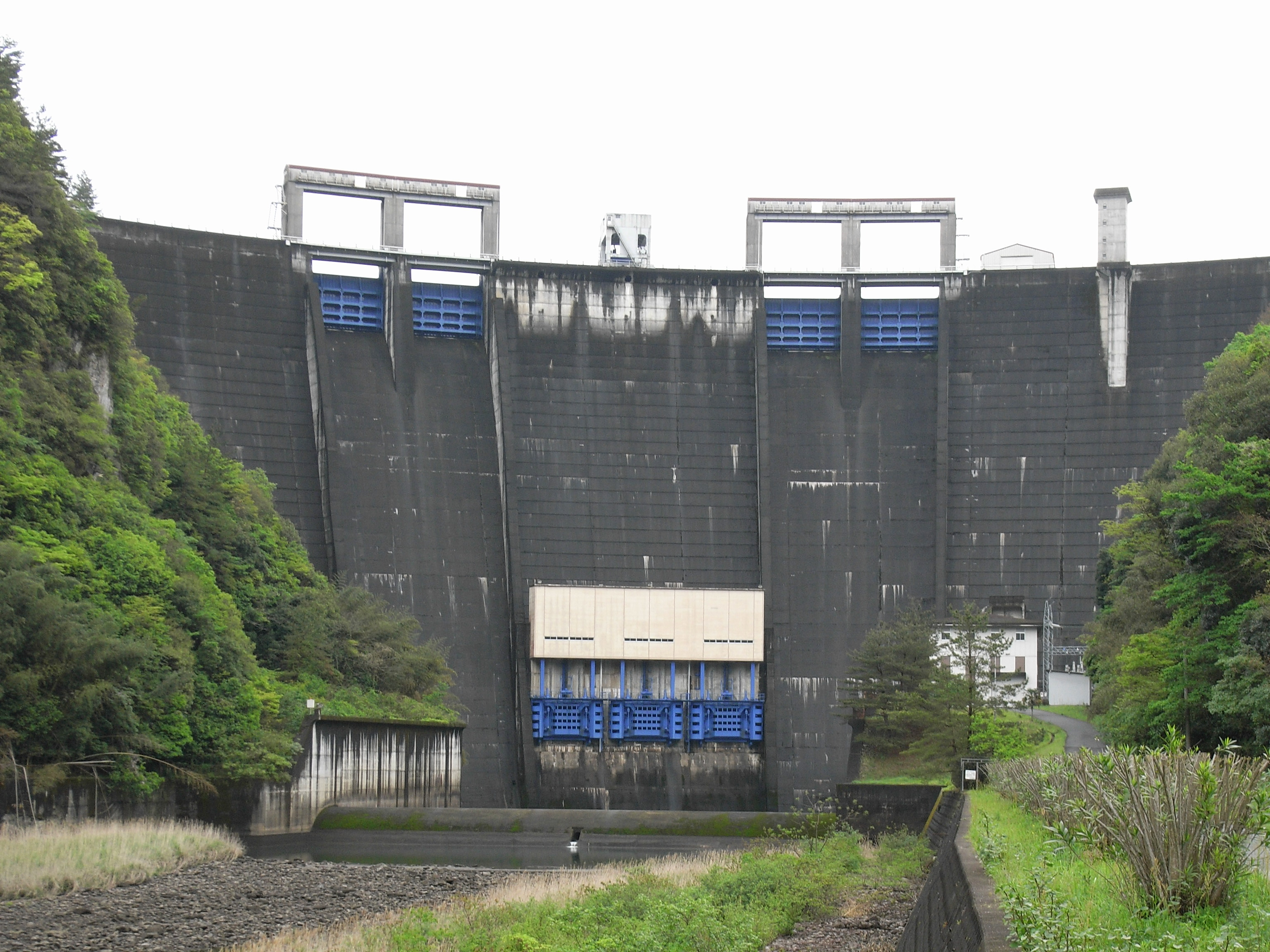 Dam